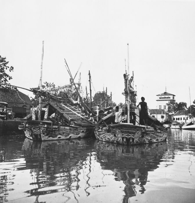 Foto. Madurese prauwen in Pasar Ikan bij de Uitkijk, Batavia